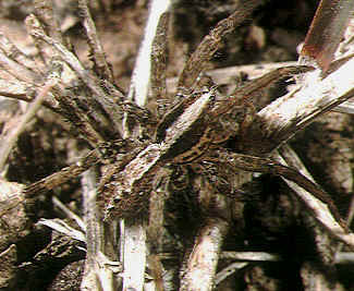 female Anahita fauna from Okinawa.